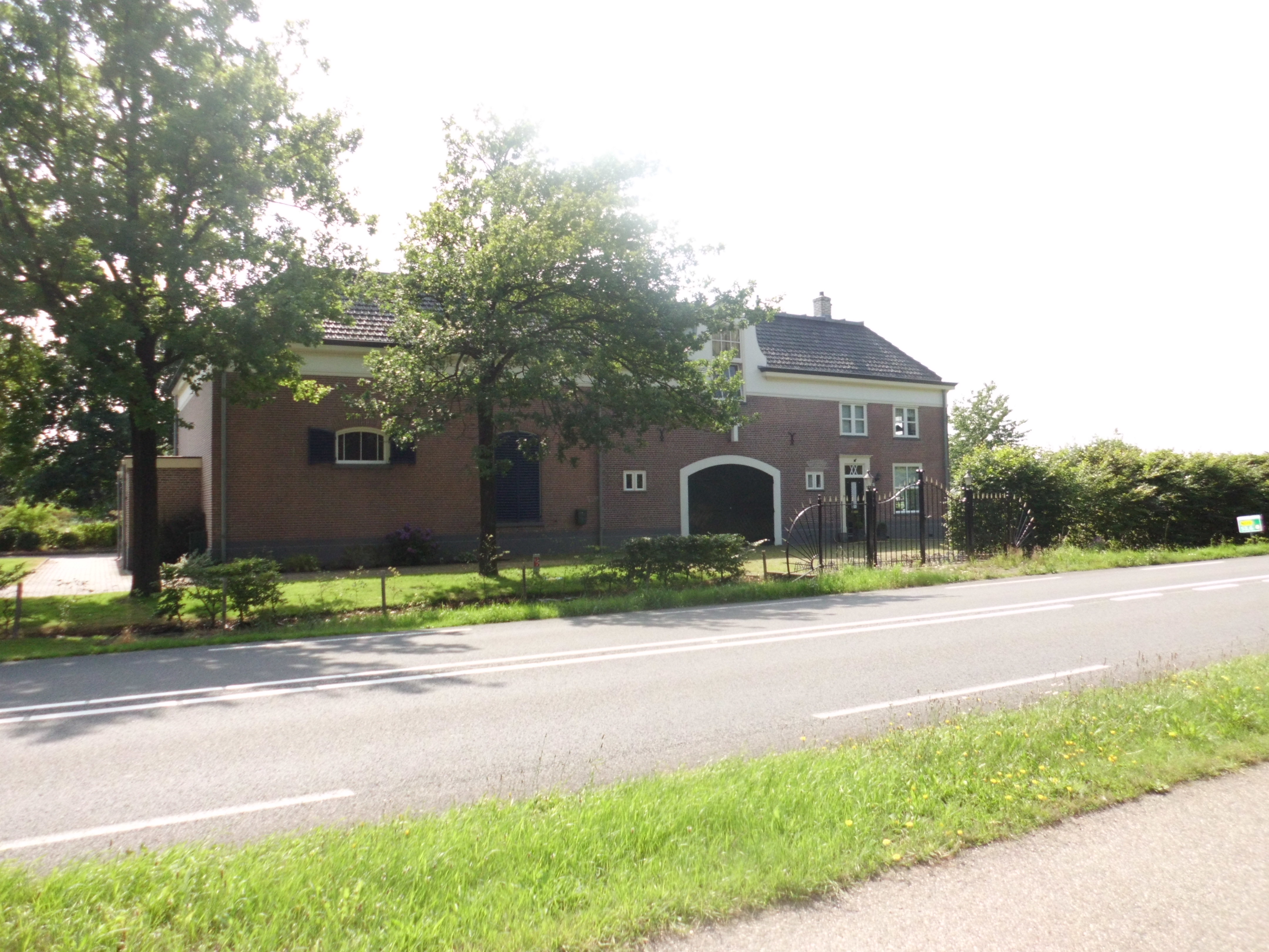 Koetshuis van De Boom Woudenberg